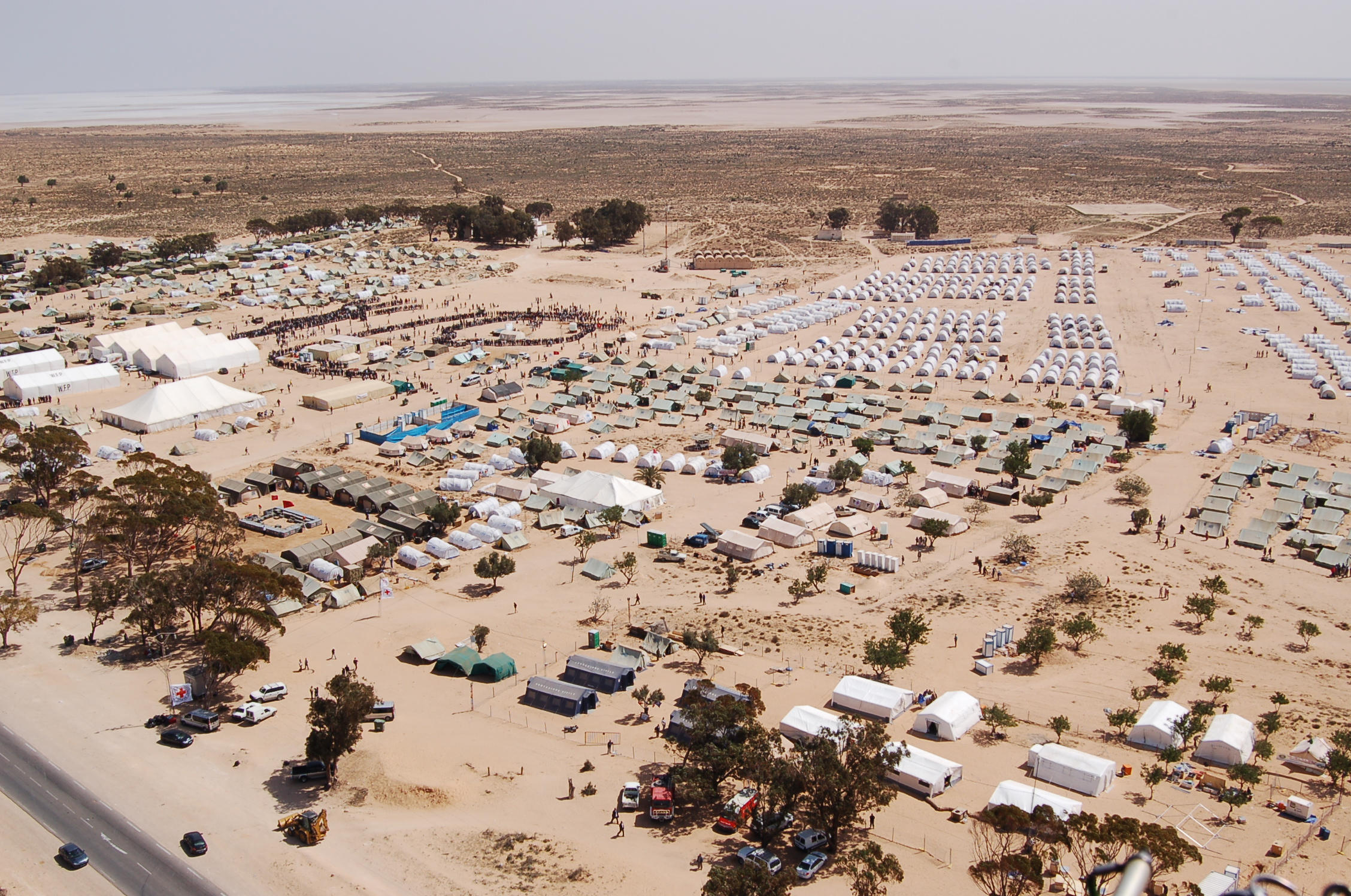 Le camp de réfugies de Choucha à coté de Ras Jedir, au sud de la Tunisie